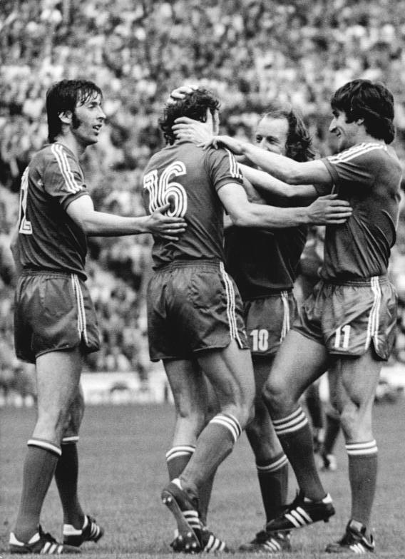 ADN-ZB-Mittelstädt-6.7.74-ma-BRD-München: X. Fußball-Weltmeisterschaft-Spiel um den dritten Platz: VR Polen - Brasilien 1:0- Freude bei den polnischen Spielern nach dem 1:0. Von links: Kazimierz Dayna,Torschütze Grzegorz Lato, Robert Gadochn und Leslaw Cmikiswicz.